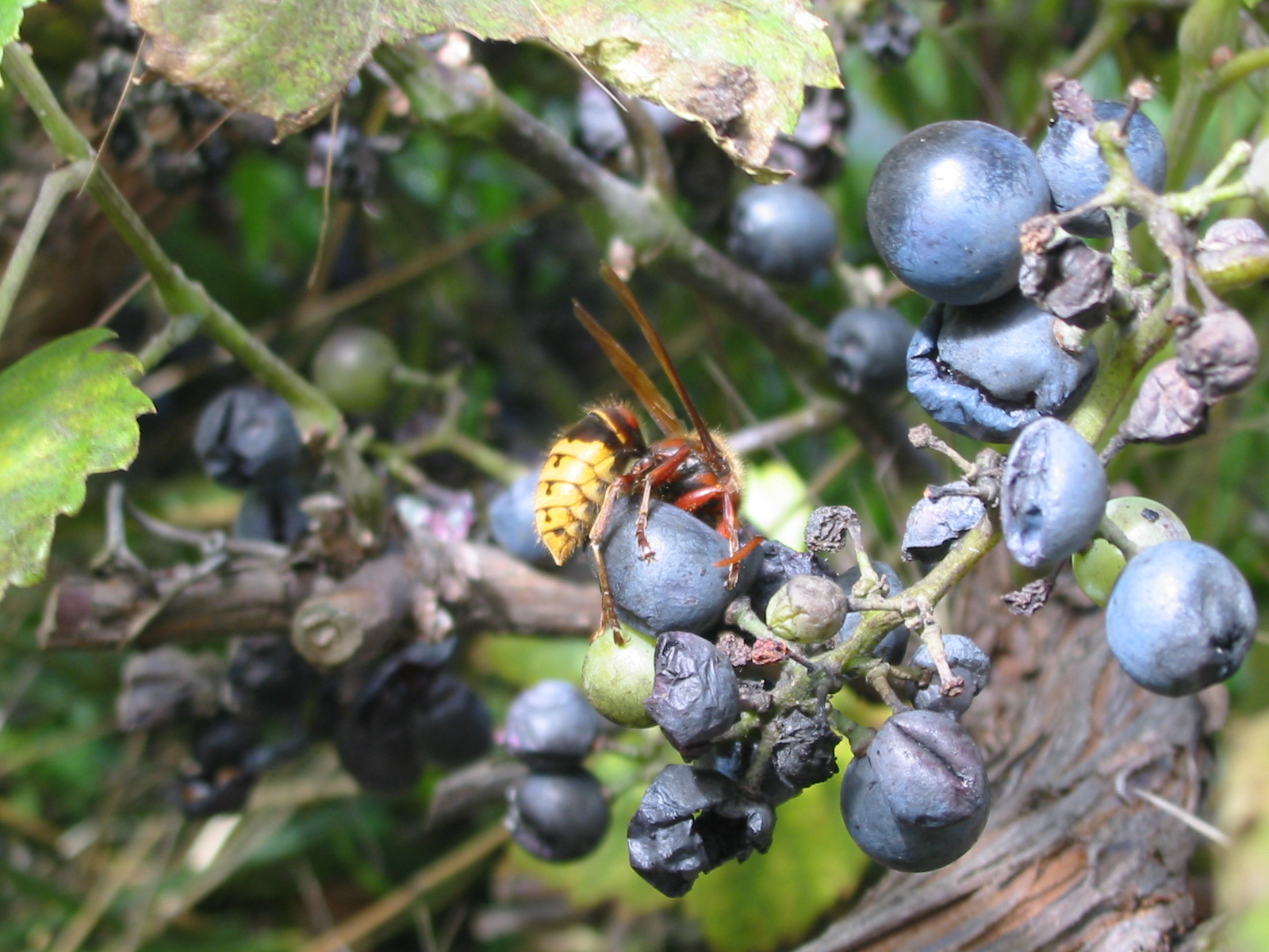 Hornisse im Weinstock